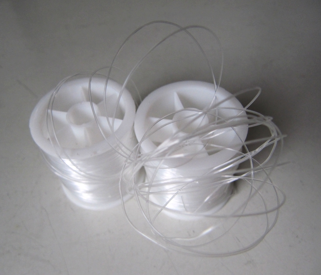 Nylon-Garn auf zwei Spulen und abgewickelt